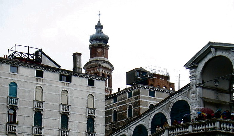 Venezia: campanile di San Bartolomeo; in basso a destra il Ponte di Rialto.